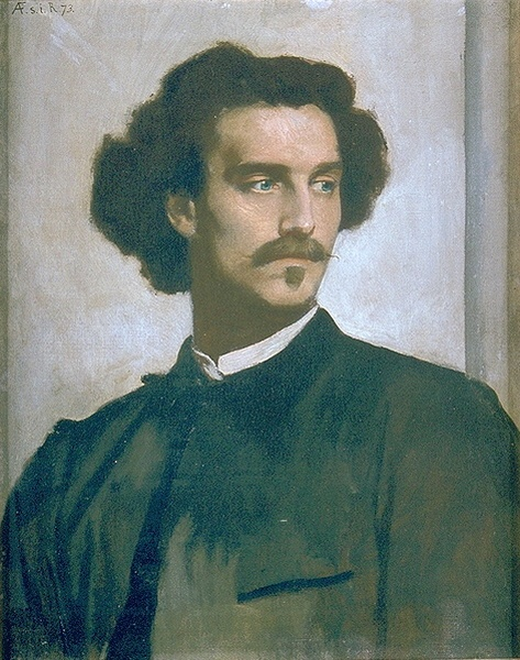 Anselm Feuerbach, Selbstbildnis, Berlin, Staatliche Museen zu Berlin